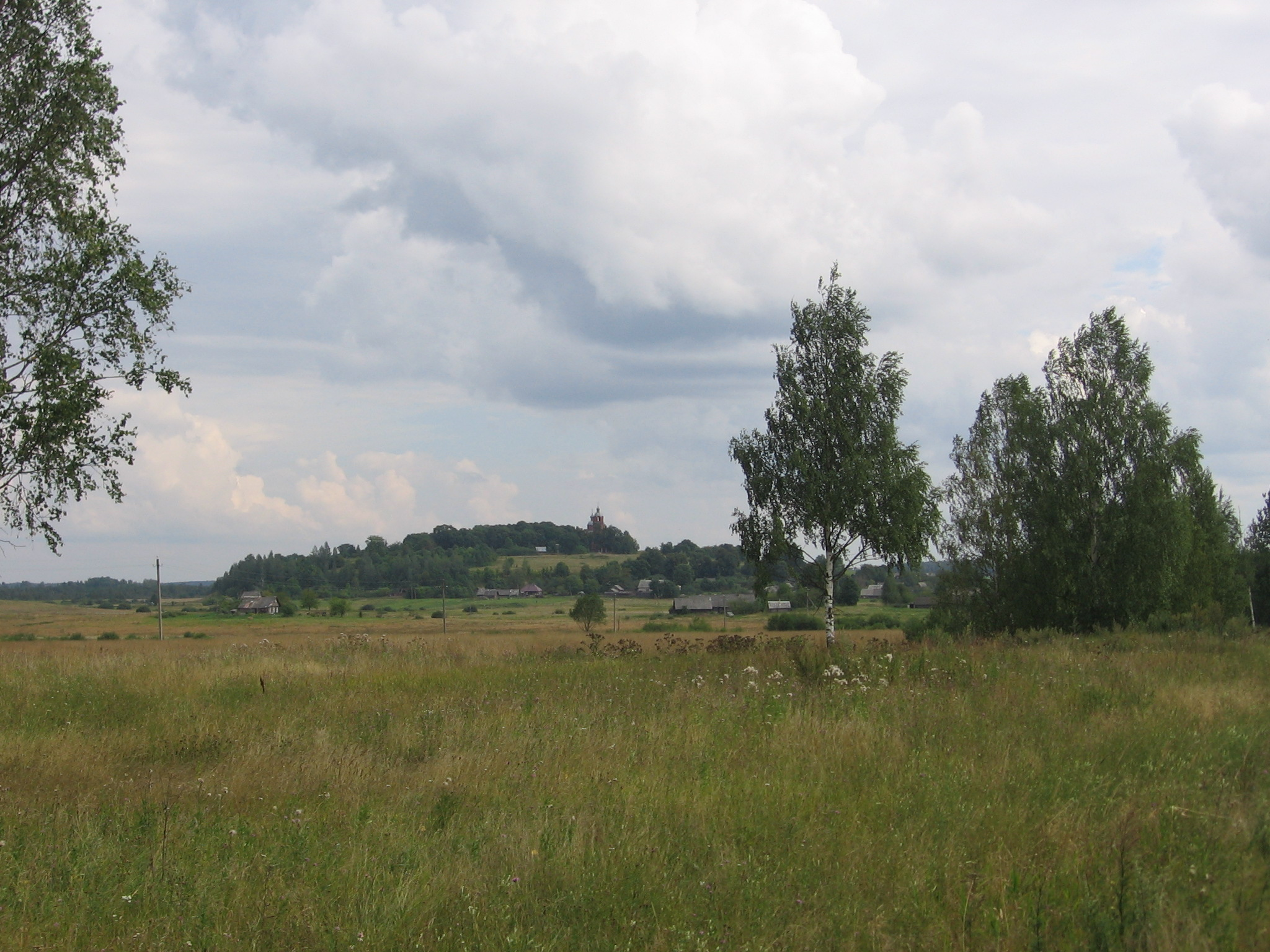 Вышгородок (Пыталовский район)